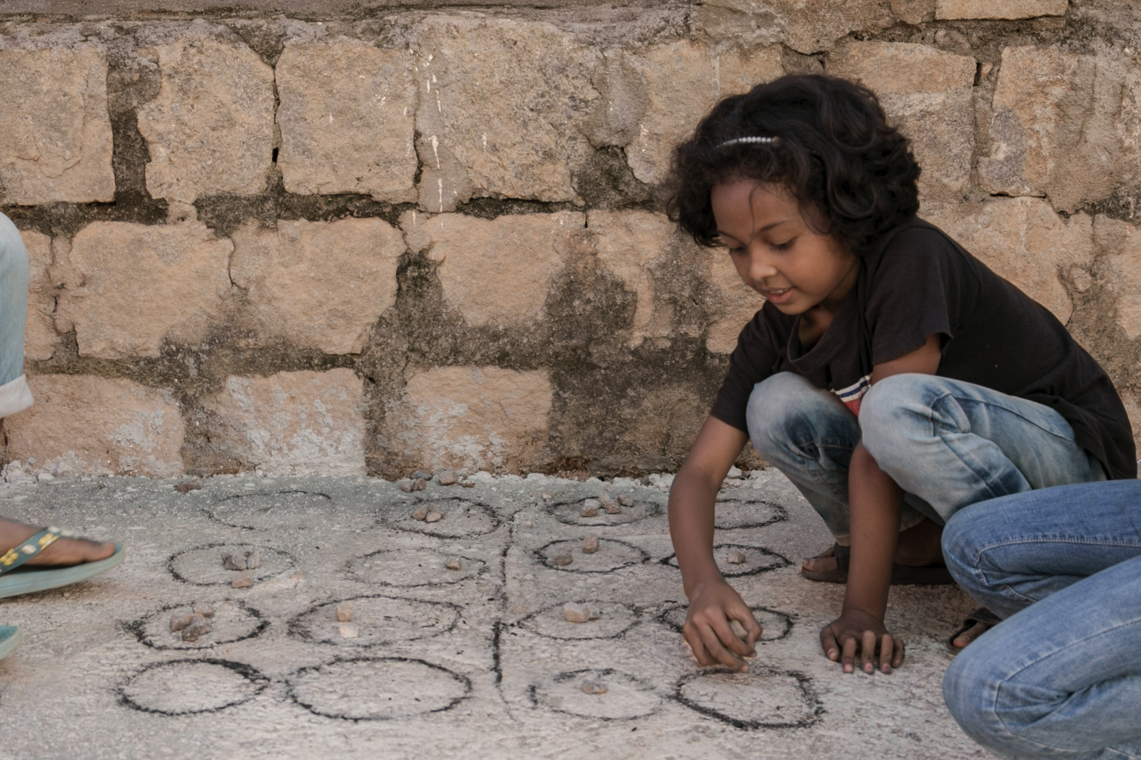 Une petite fille jouant au "Katro" . jeu consiste à récupérer tous les pions de l'adversaire. This is an image with the theme "Play" from: Madagascar